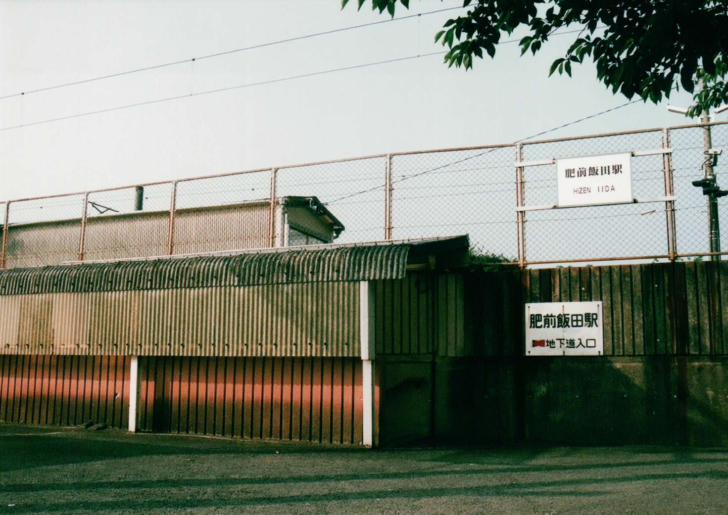 肥前飯田駅(2010/05/04)